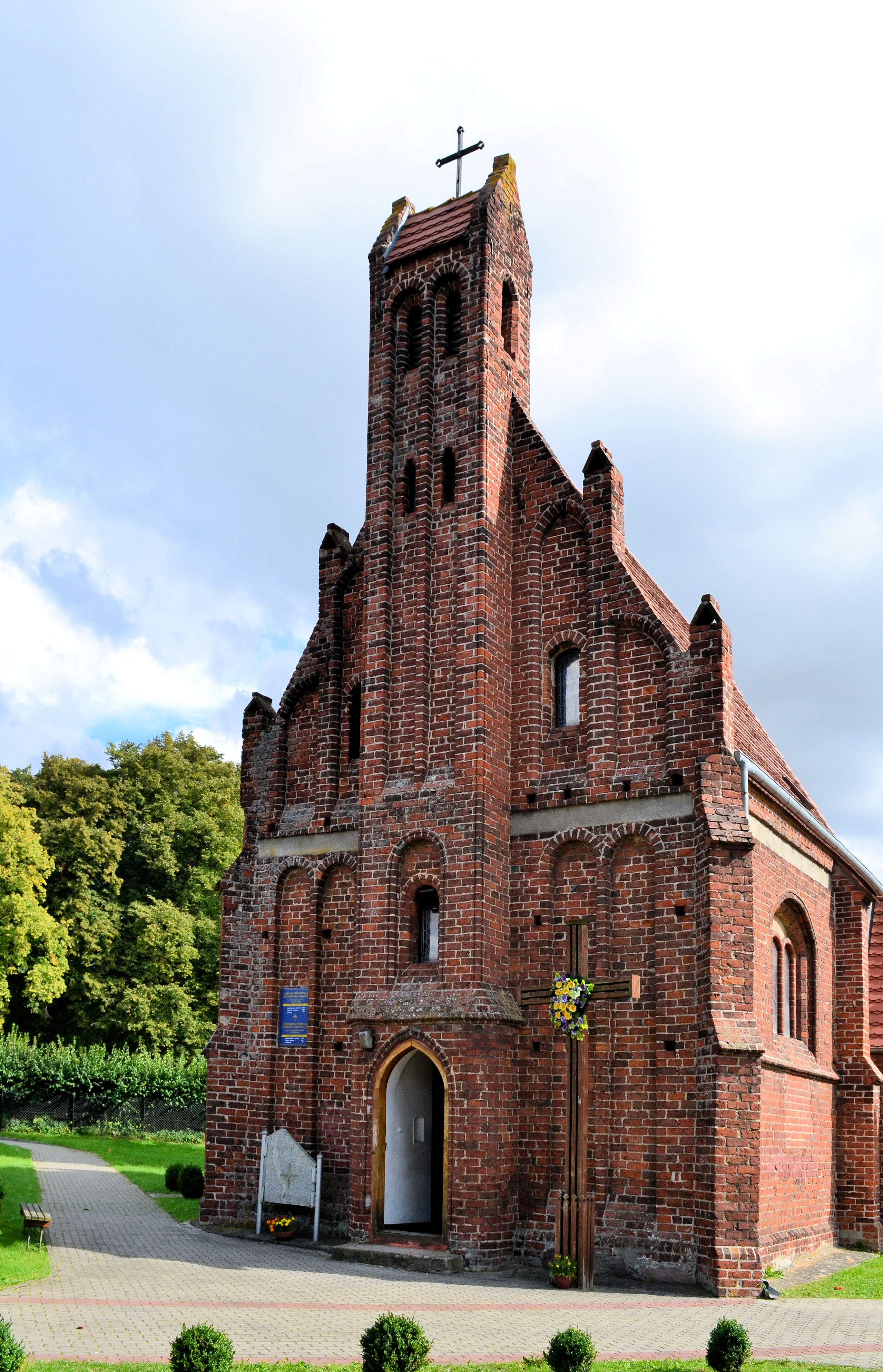 Trzebiatów, ul.II Pułku Ułanów 26 - dawna kaplica św. Gertrudy, obecnie cerkiew pw. św. ap. Piotra i Pawła